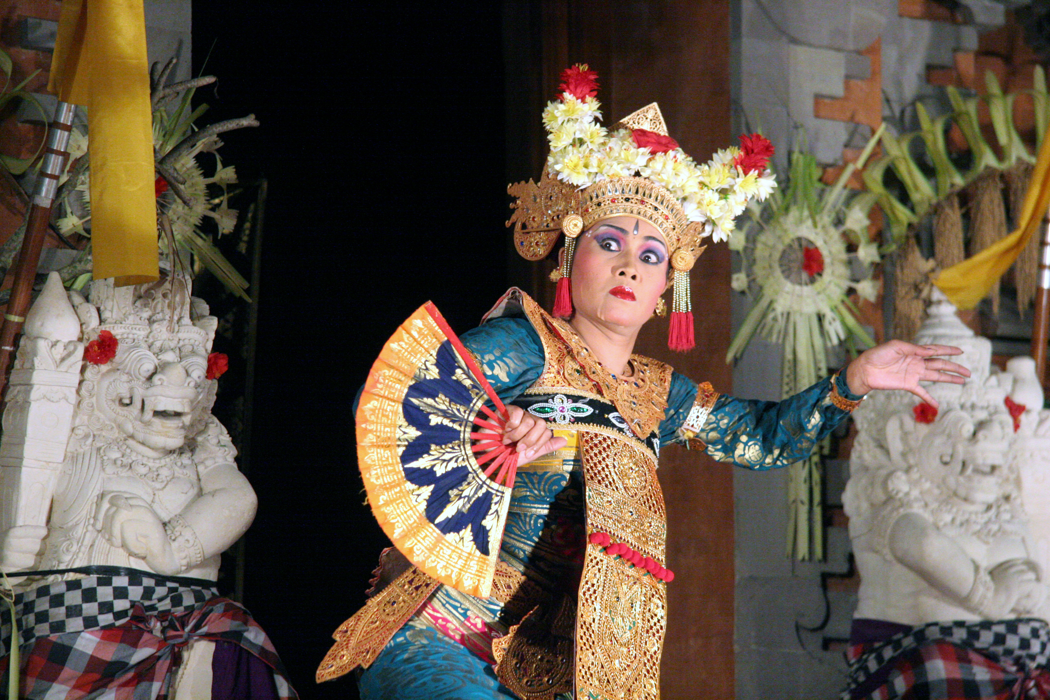 bali ubud danseuse